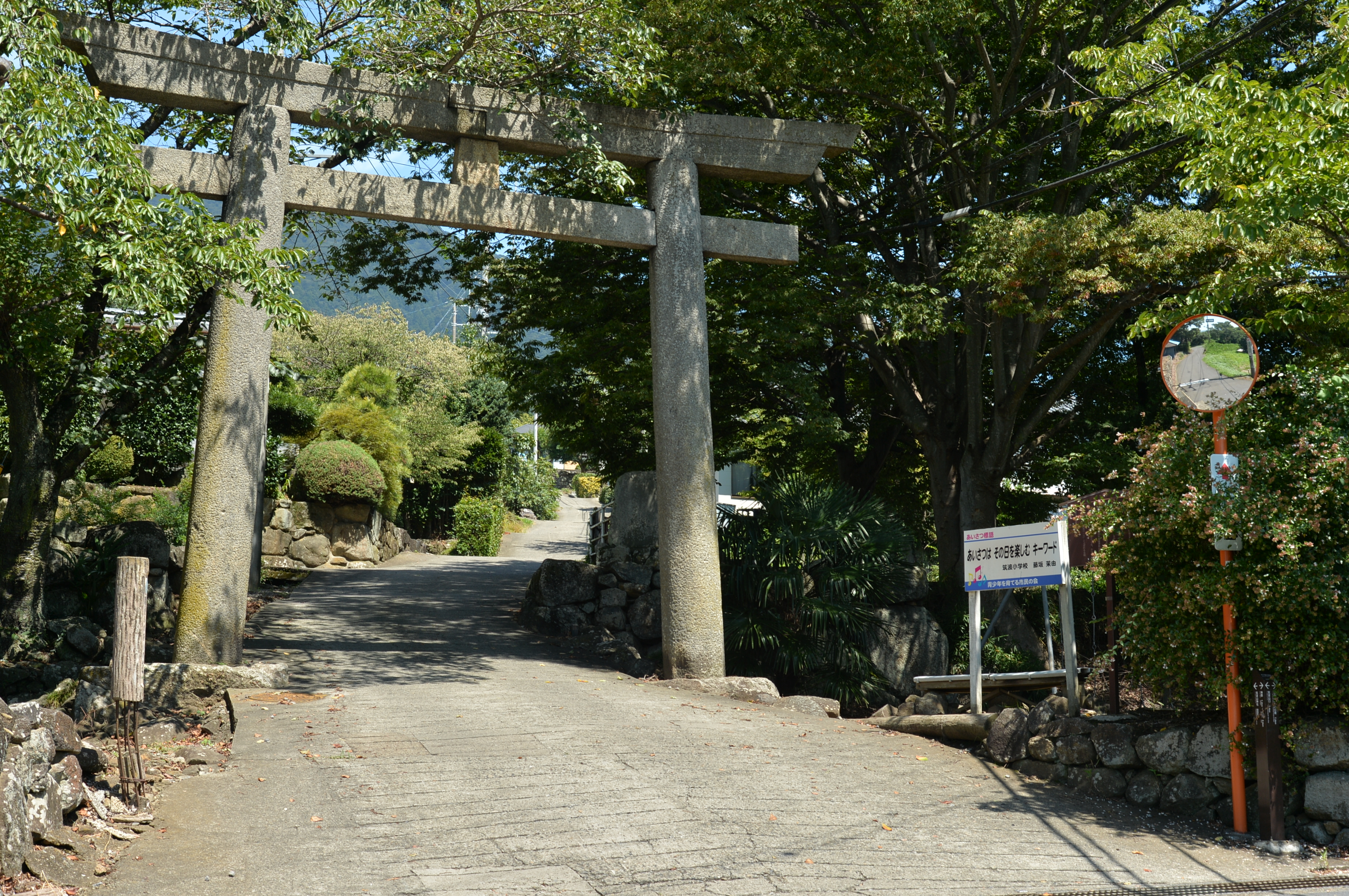 筑波山神社一の鳥居（茨城県つくば市）